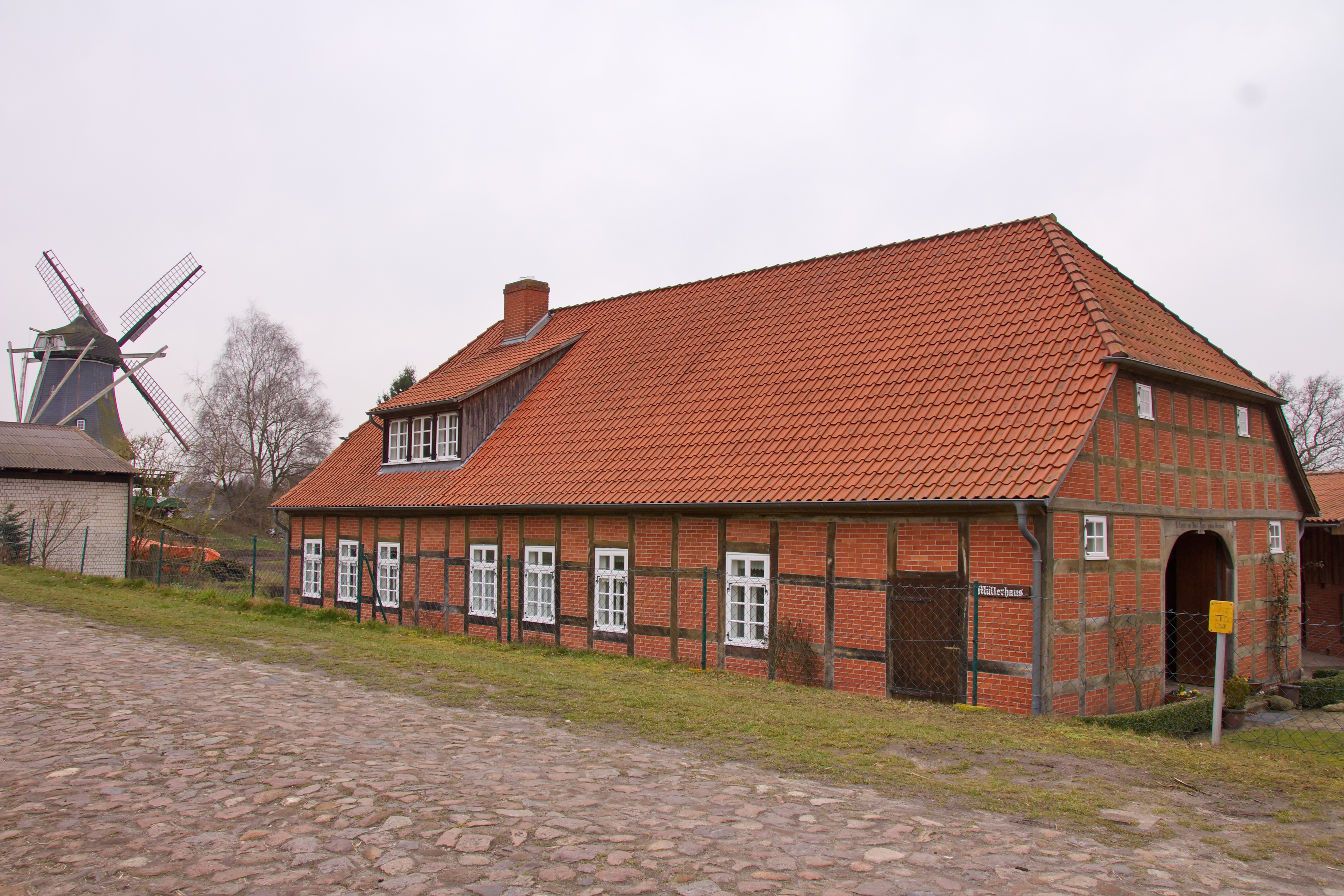 Baudenkmal Müllerhaus Brunsbrock (Kirchlinteln), Niedersachsen, Deutschland